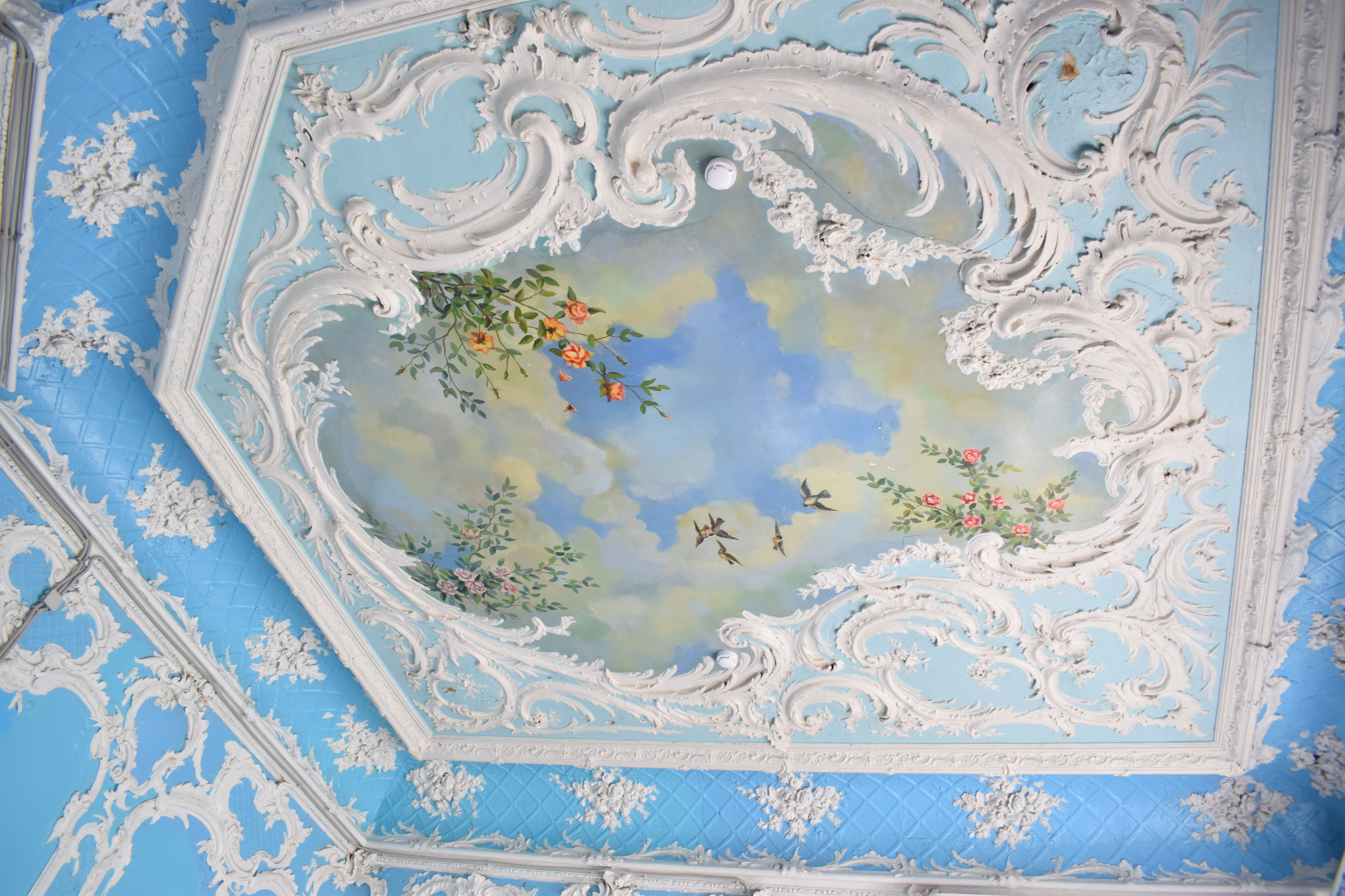 Особняк Локалова